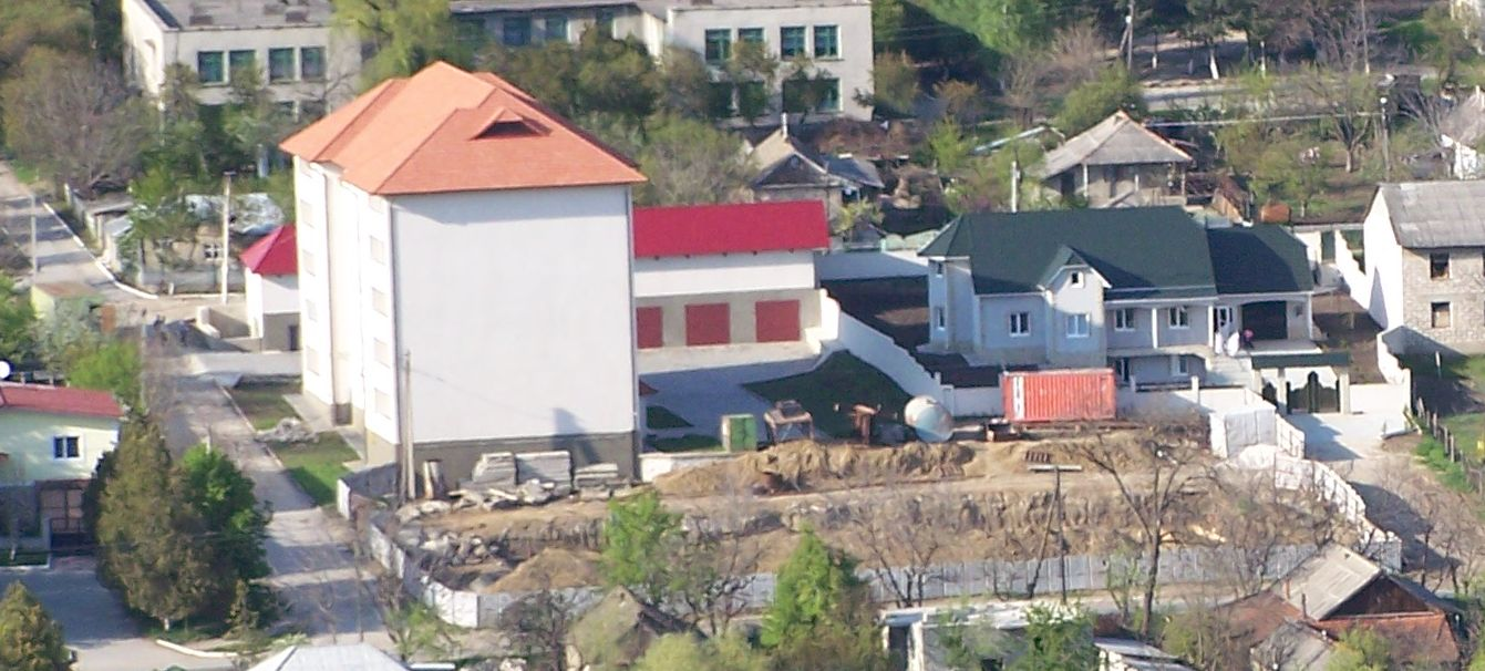 Новый 5-этажный жилой комплекс. Располагается рядом с лицеем им.М.Эминеску (бывш. с/ш N3).